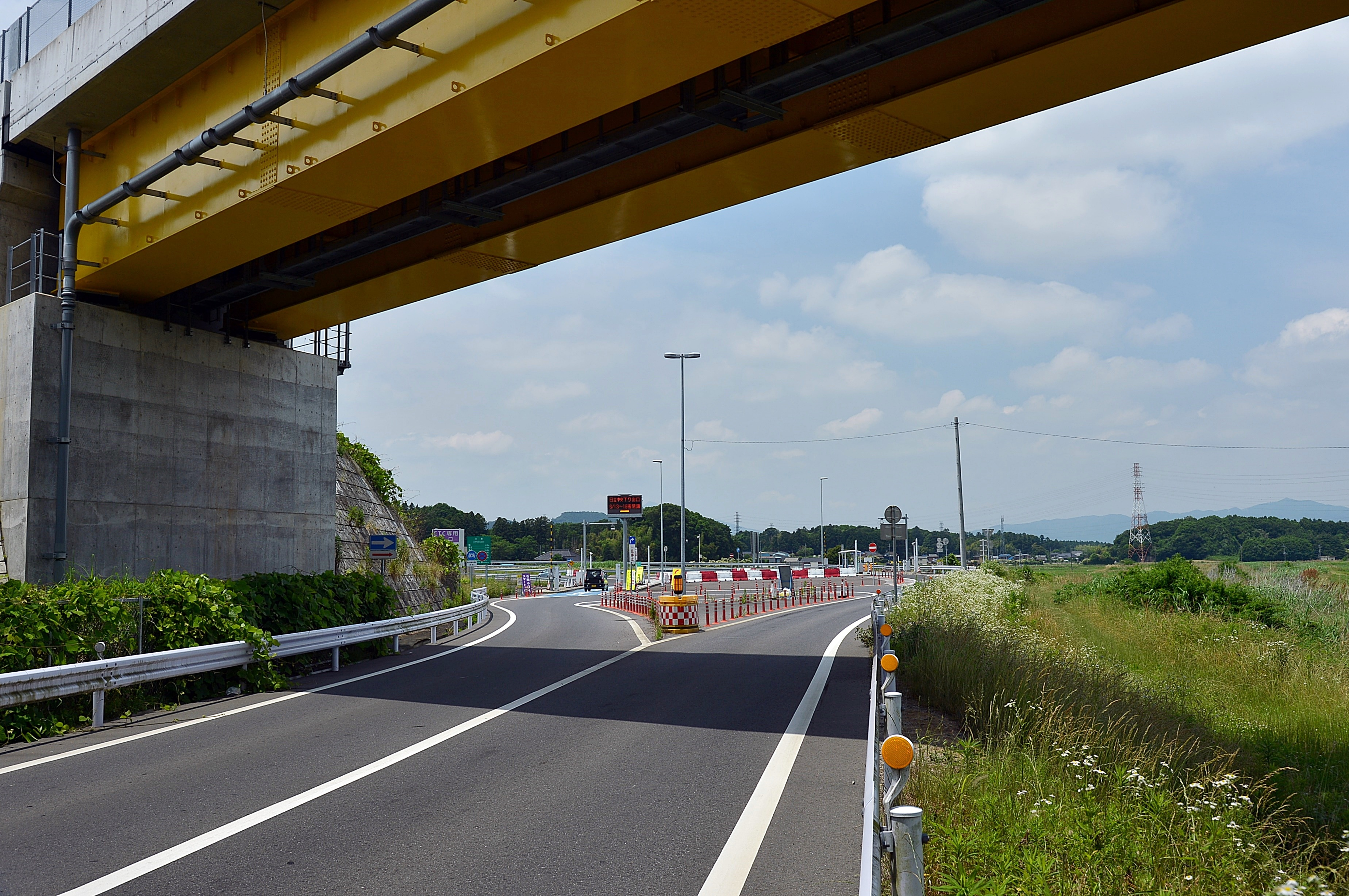 石岡小美玉スマートインターチェンジの下り線出入口ゲート。常磐自動車道の水戸・いわき方面へ向かう時に通過するゲート。ゲート手前にUターン可能な転回場が設けられている他、ゲート内側（高速道路側）からゲートを出る手前にも、同様な転回場が設けられている。